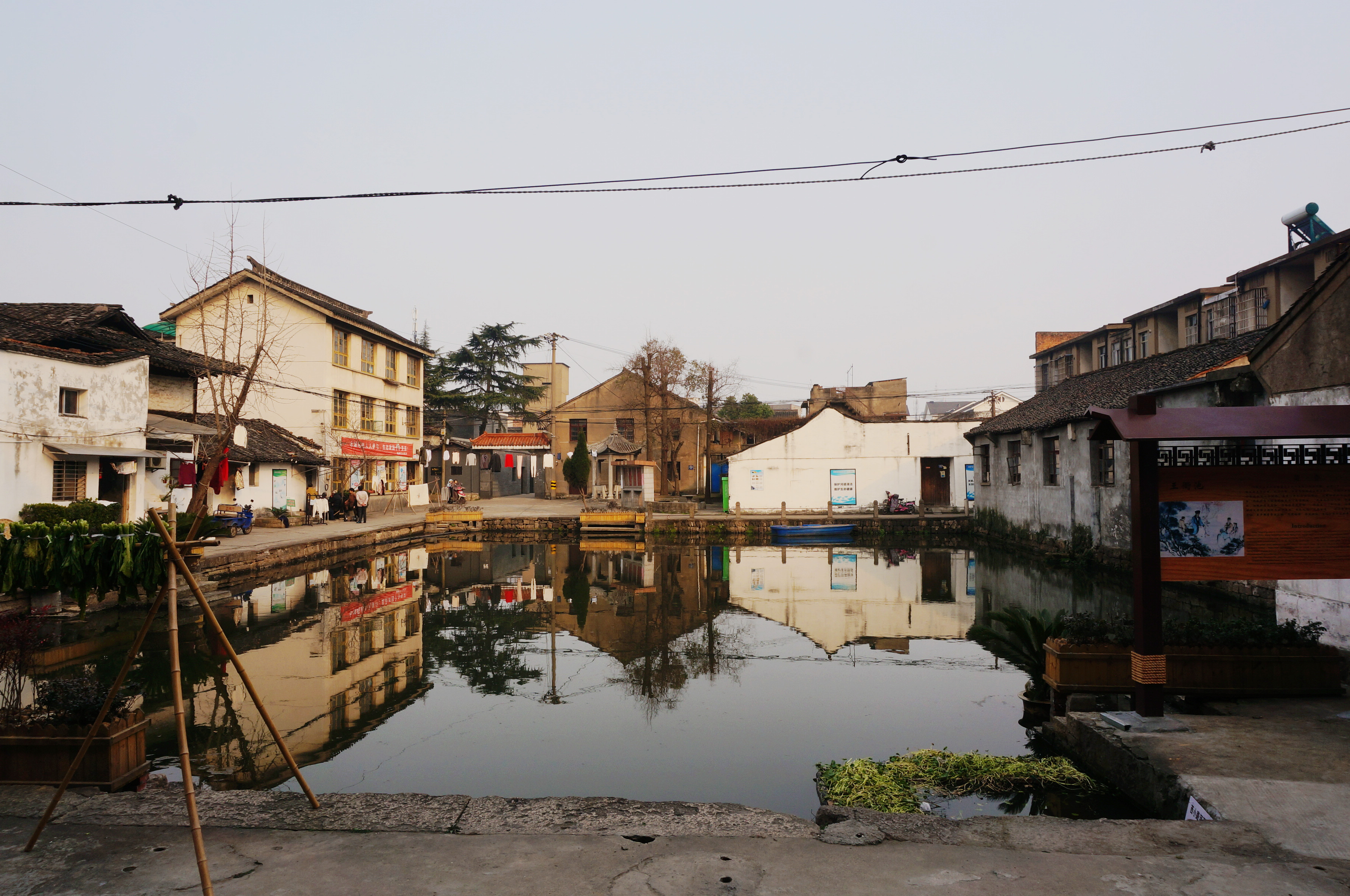 新建伯府第遗址，王衙池，自西向东看。